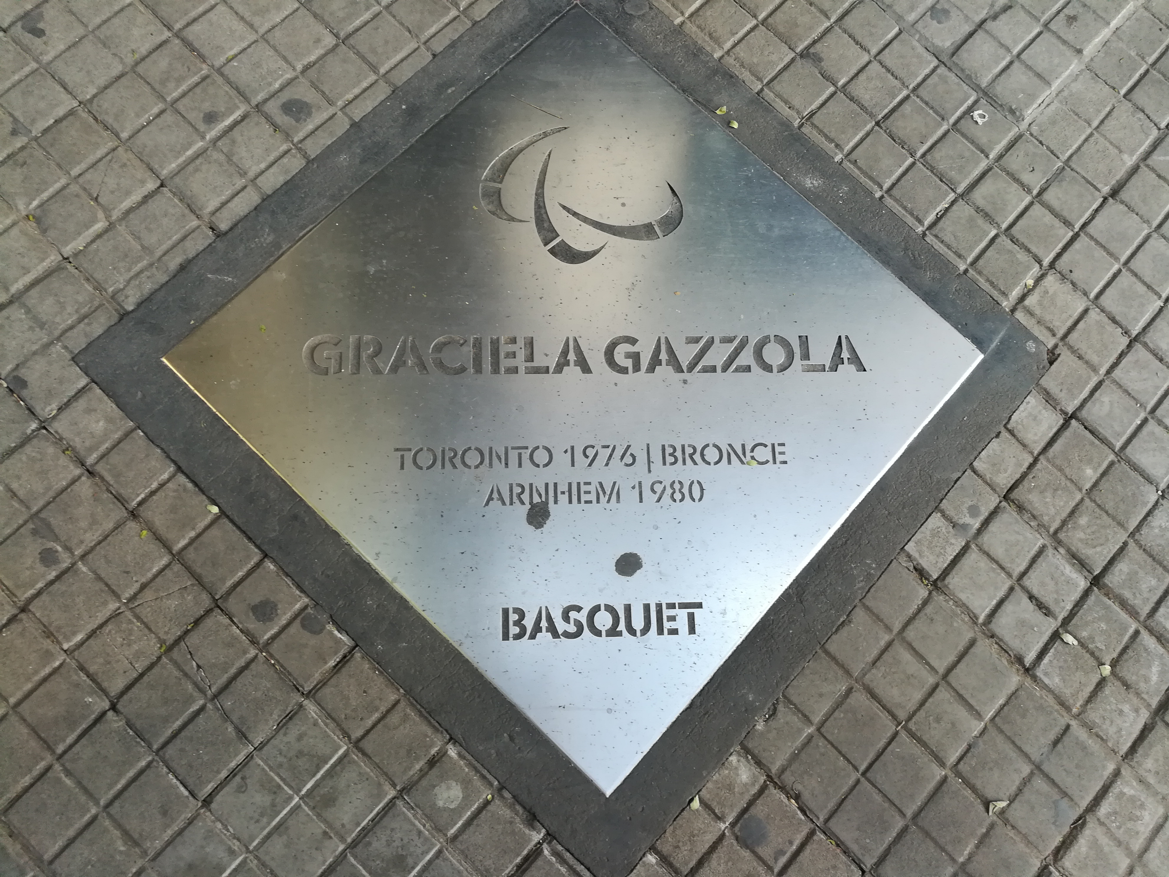 Paseo de los Olímpicos de los en la Avenida Pellegrini (Rosario).